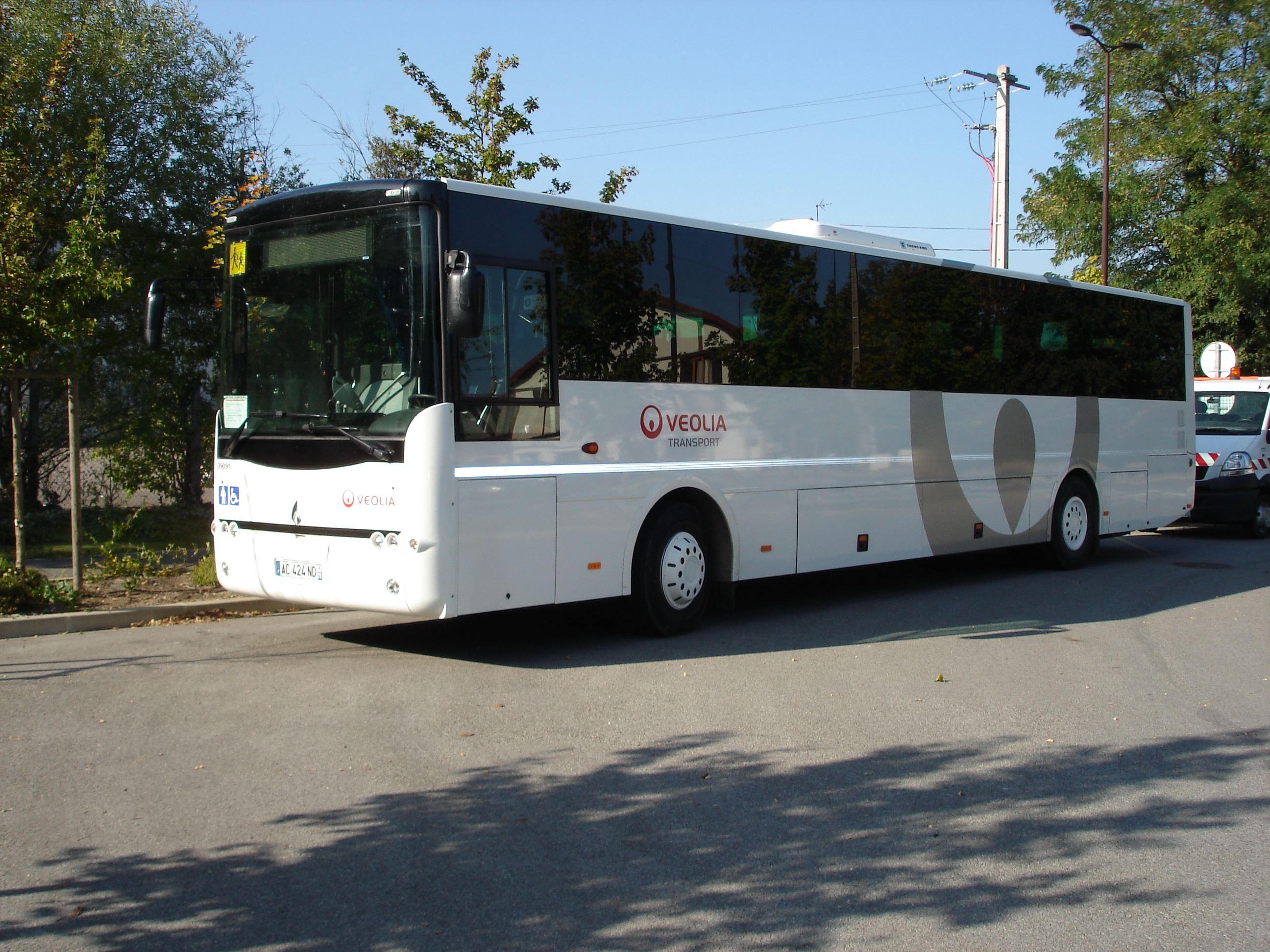 Un autocar Veolia Transport Houdan, de type Fast Concept Car Syter, de la ligne 02 (Montfort-l'Amaury ↔ Dammartin-en-Serve), à Garancières (78).